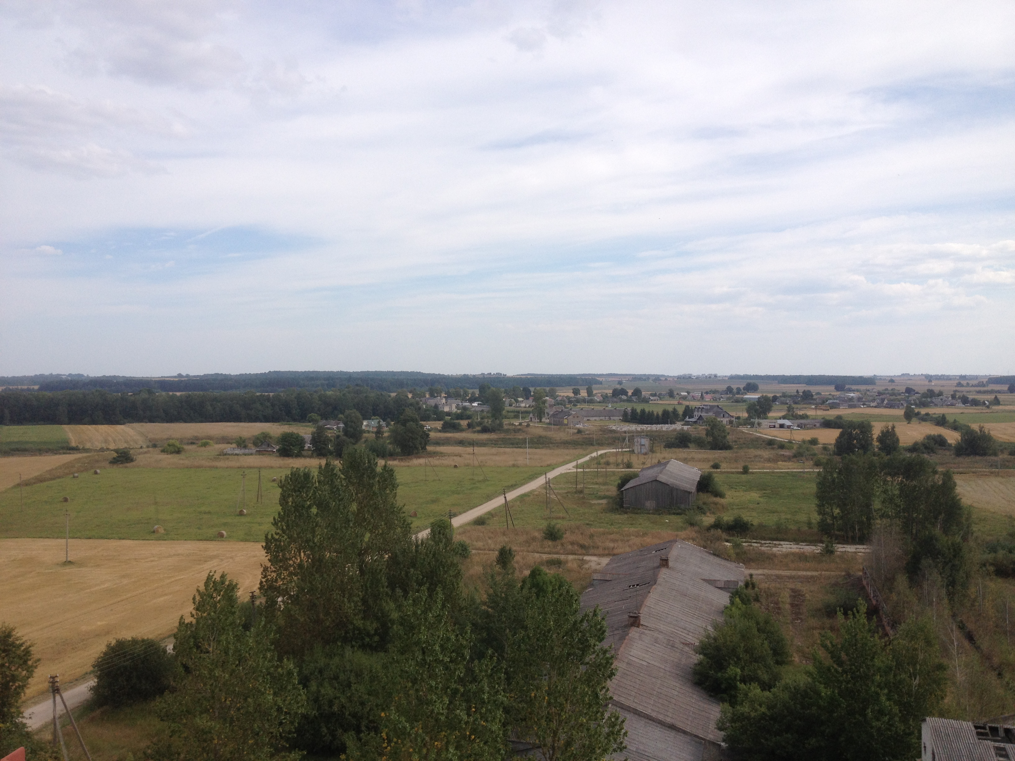 Kaimo vaizdas nuo elevatoriaus